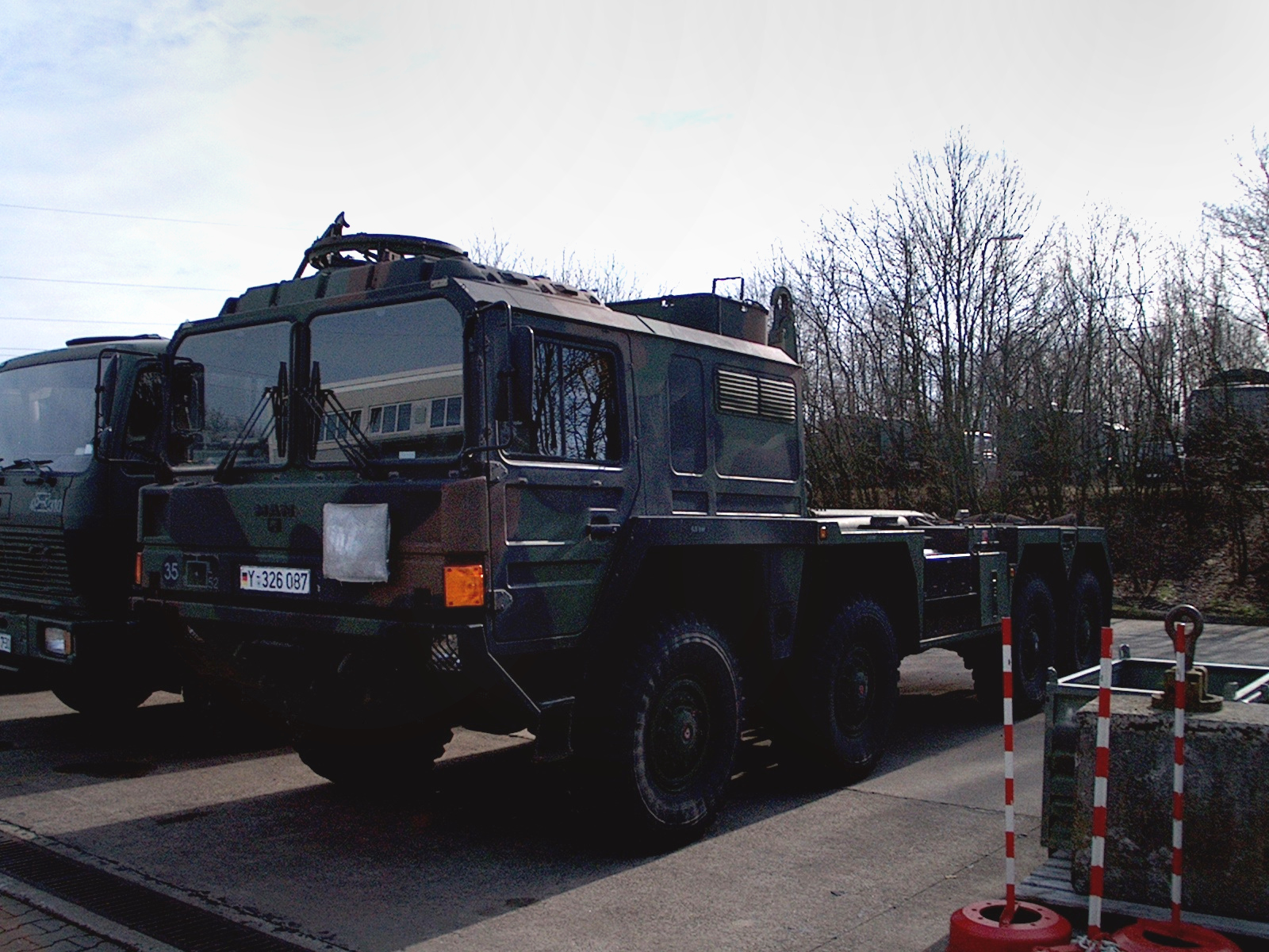 MAN MULTI der Bundeswehr Aufnahme: 1./345 (BeobPzArtLBtl) Kusel